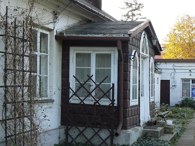 Dwór z XIX wieku, klasycystyczny, murowany, w 1944 roku podpisano w nim kapitulację Powstania Warszawskiego